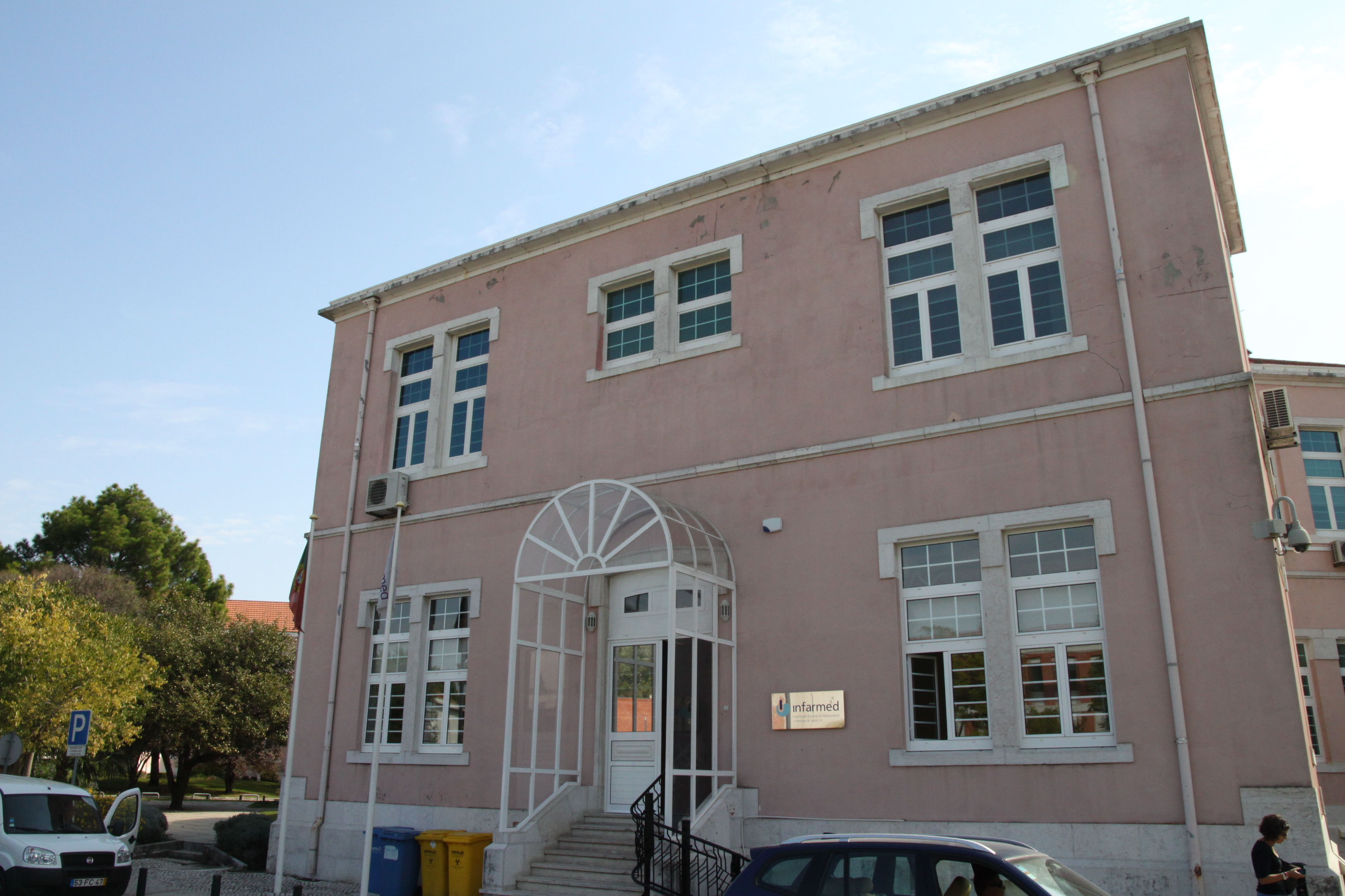 Hospital Júlio de Matos This file was uploaded for Wiki Loves Monuments in Portugal with the unique identifier 97005051.